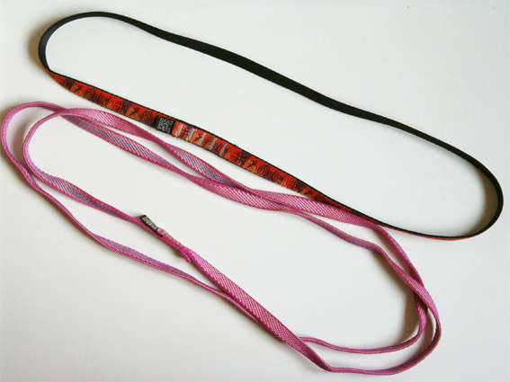 Klein en middelmaat genaaide bandlussen (bandschlingers)